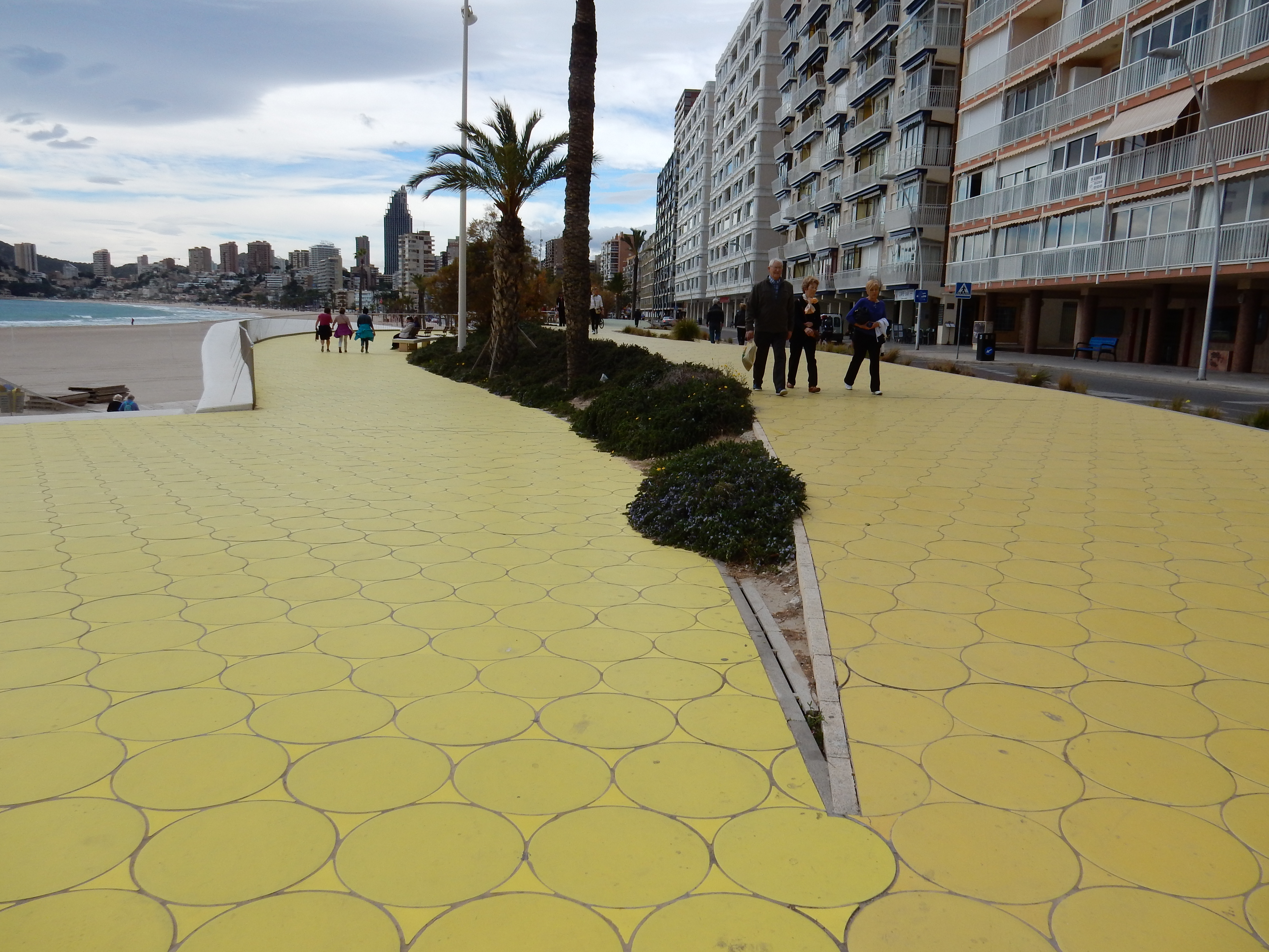 Benidorm, Spain